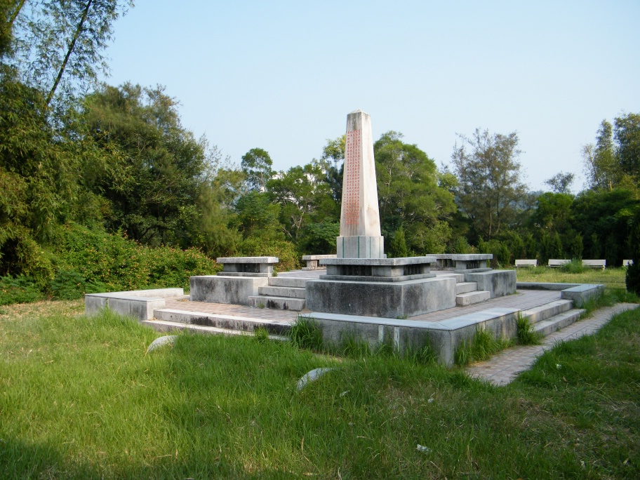 达濠万人墓纪念碑